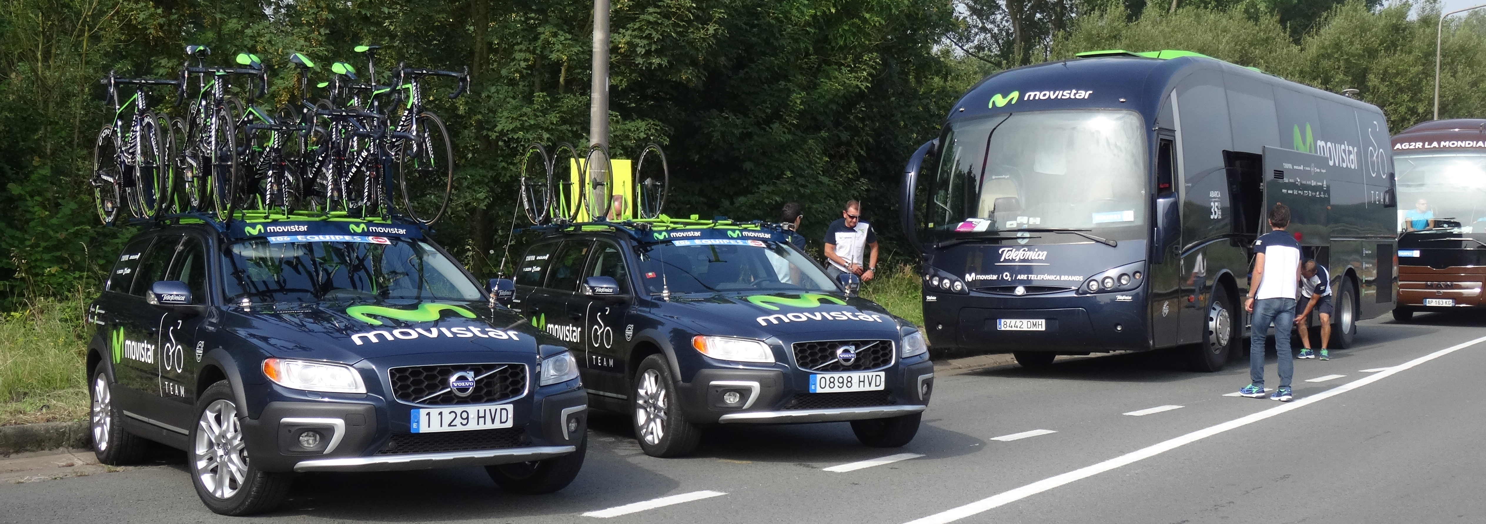 Reportage photographique réalisé le dimanche 27 juillet à l'occasion du départ de la deuxième étape du Tour de Wallonie 2014 à Péronnes-lez-Antoing (Antoing), Belgique.